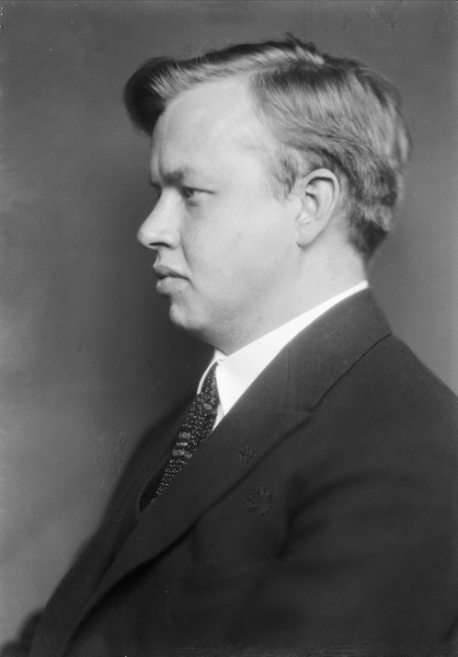 Dyre Vaa (1926), portrett, mann, billedkunstner, billedhugger, brystbilde, profil.